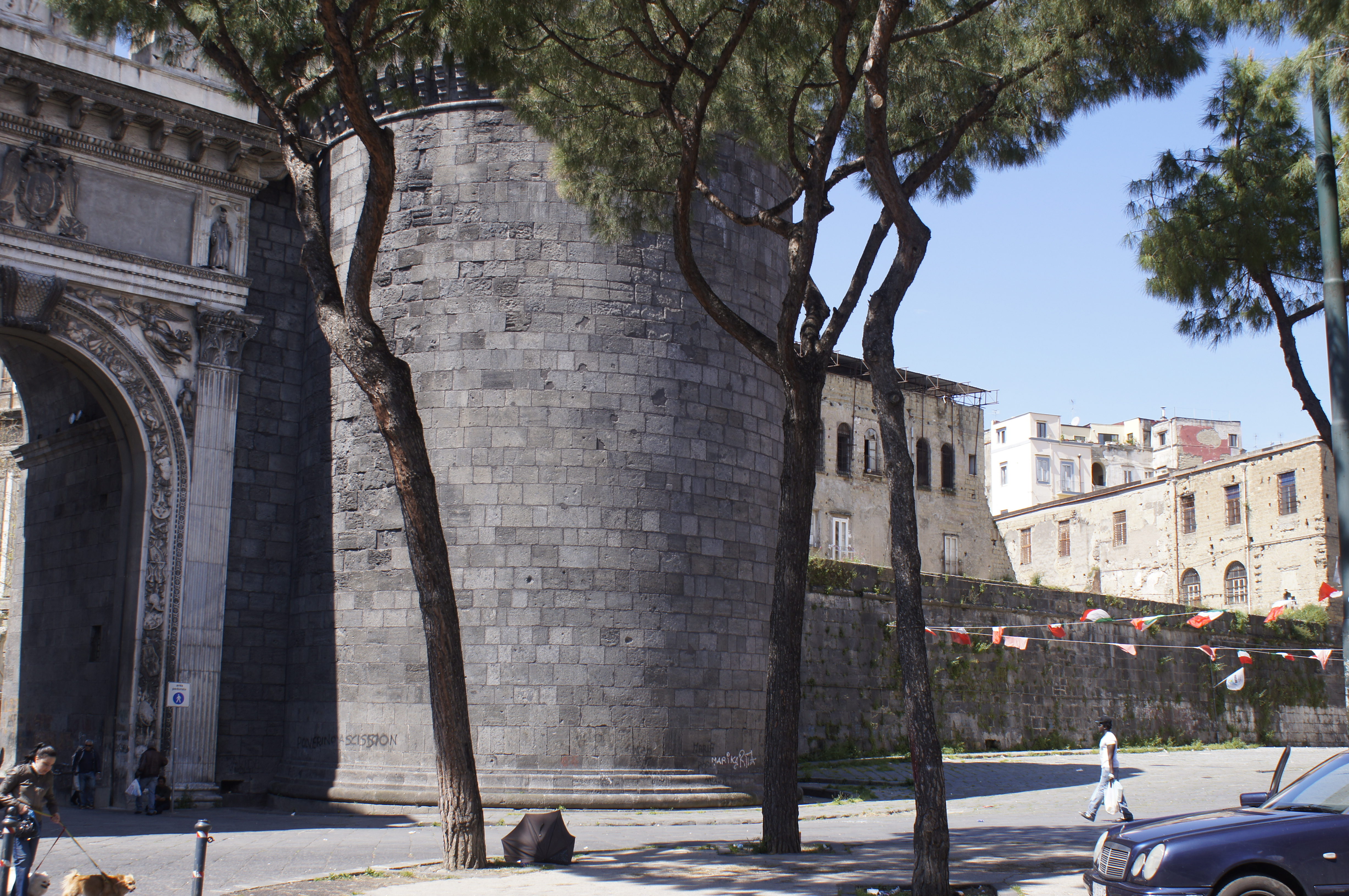 Vasto, Napoli, Italy